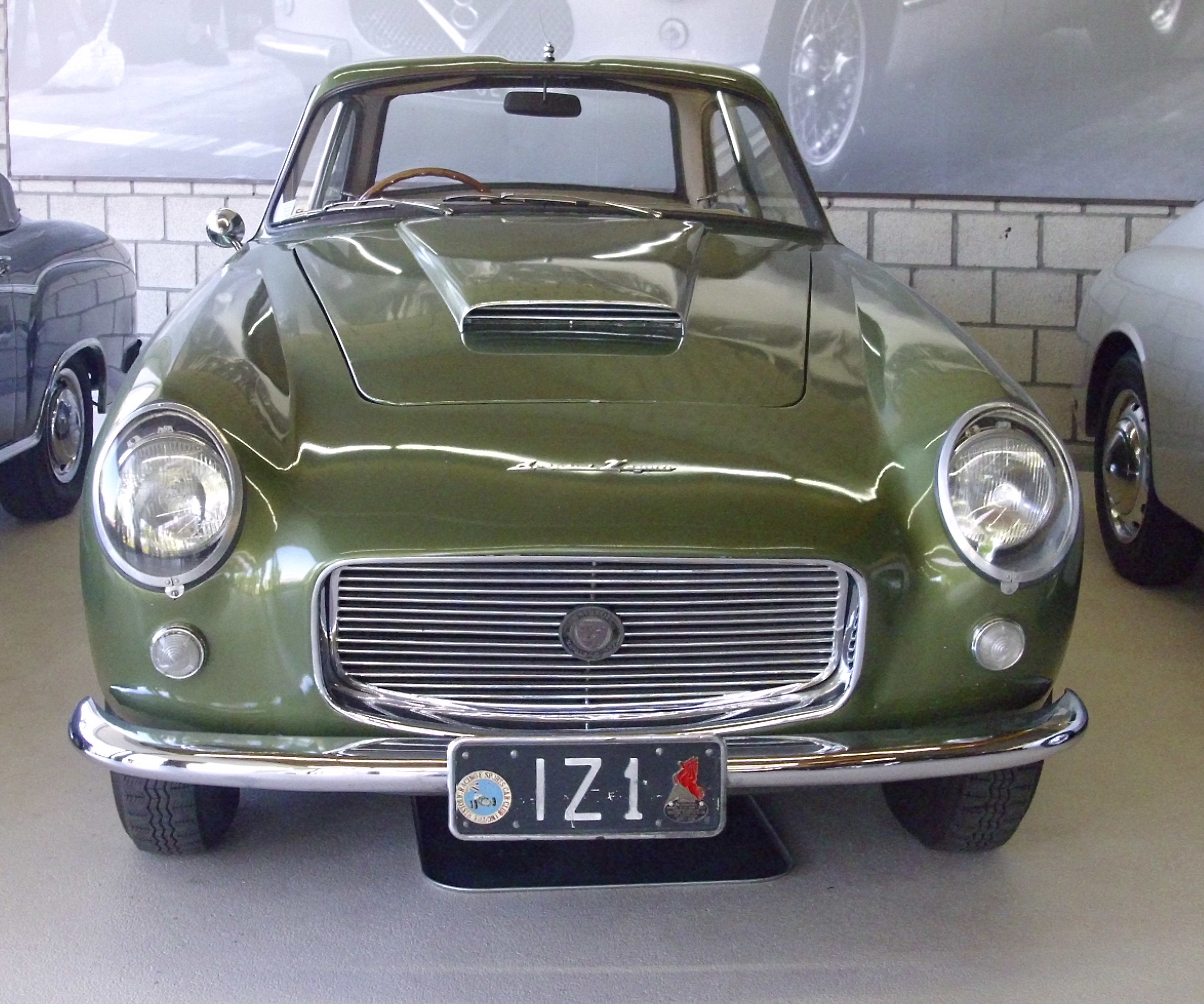 Bristol 406 Zagato 1959